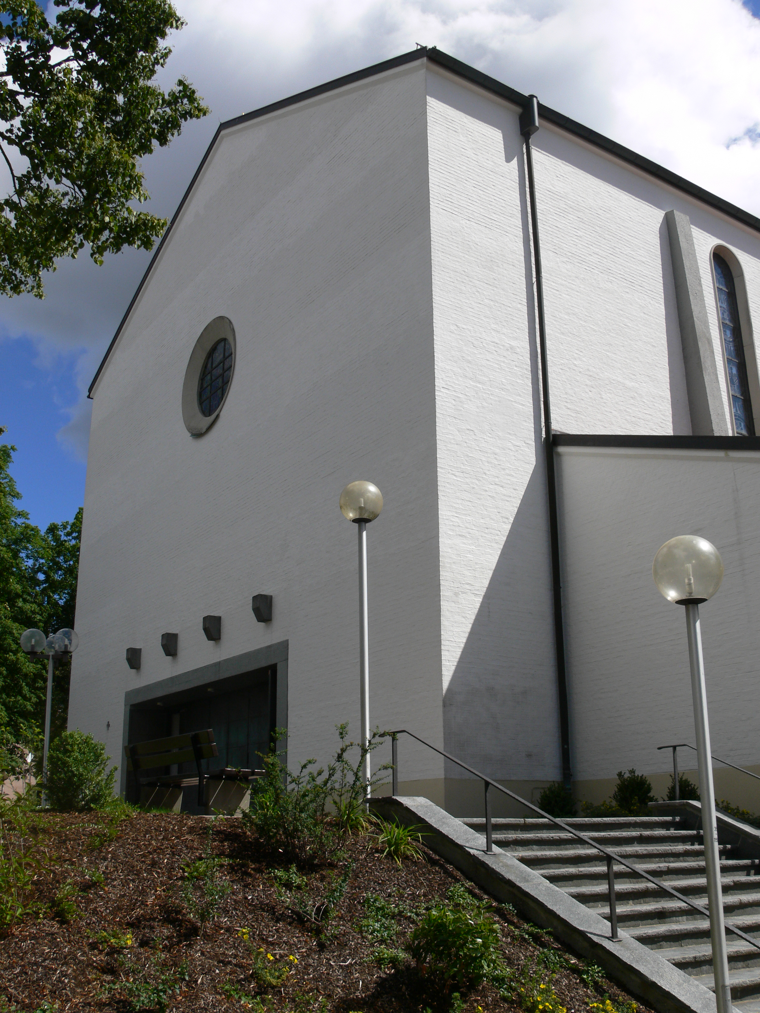 Katholische Pfarrkirche Christus König (Christkönigskirche), Ravensburg